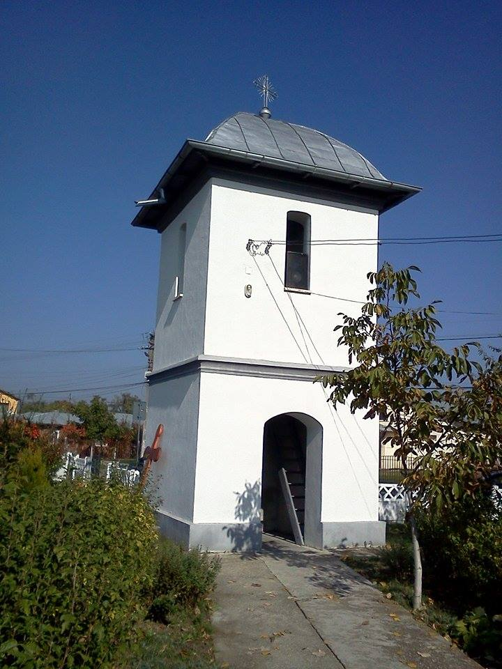 Turn clopotniță 02